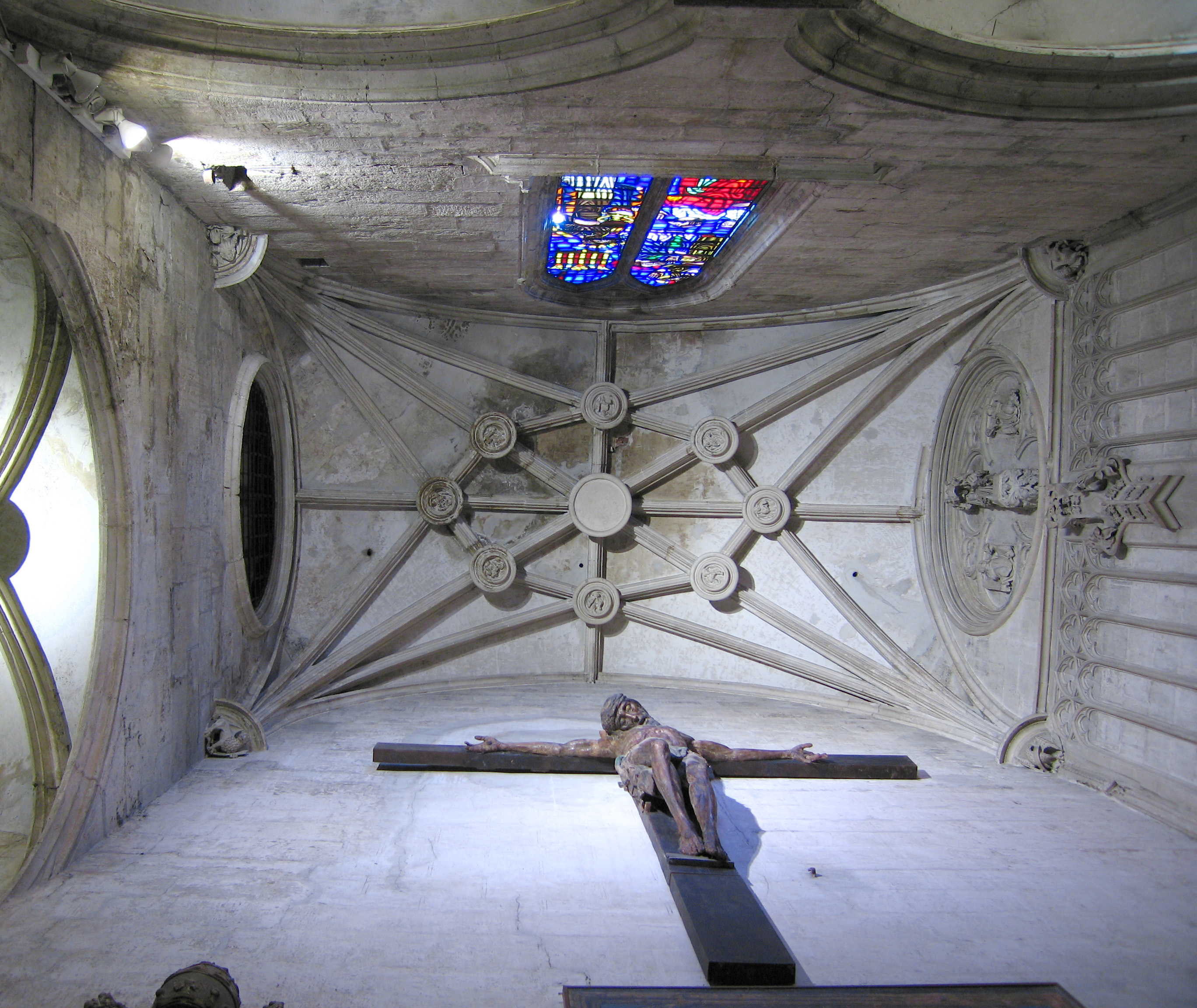 passadís capella sant calze seu valència